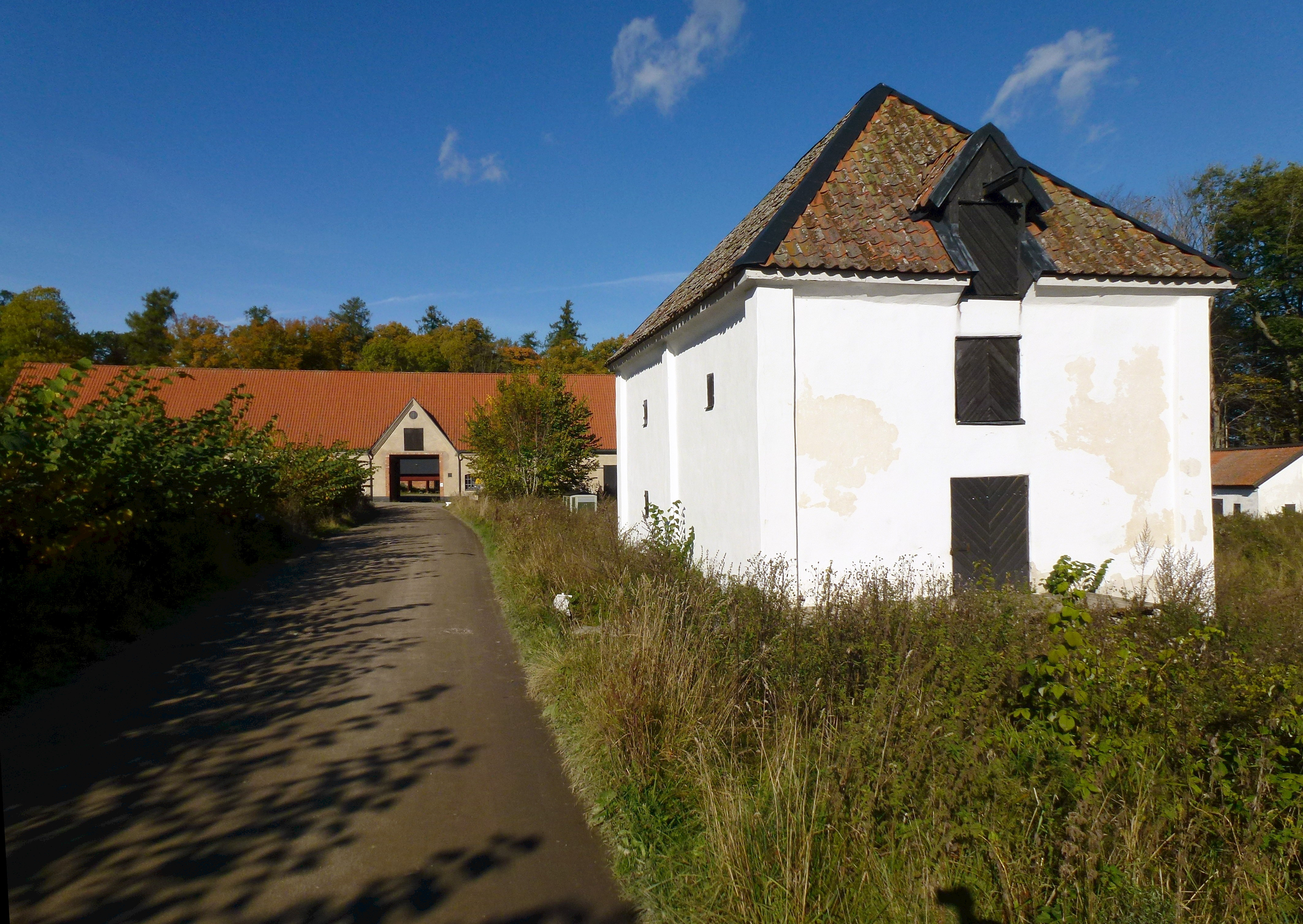 Sturehov slott, ekonomibyggnader